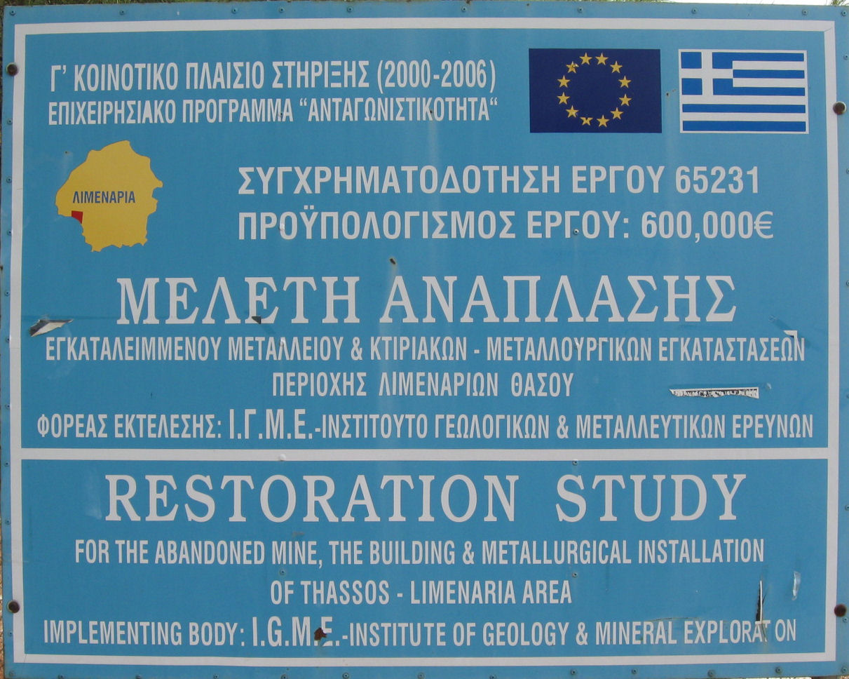 Projektbeschreibung am ehemaligen SAMM-Verwaltungsgebäude in Limenaria